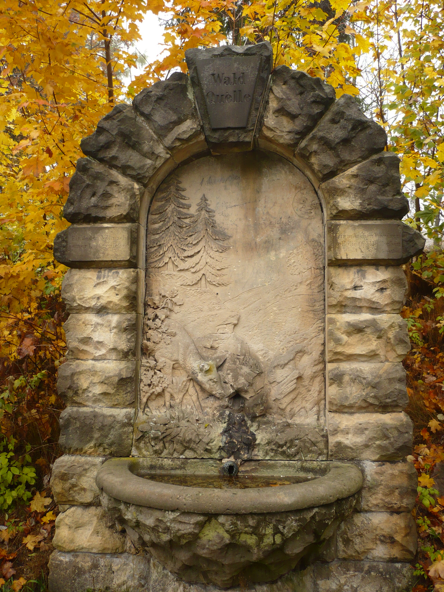 Sokołowsko - ujęcie wody pitnej / pomnik Leśne Źródełko (Waldquelle)